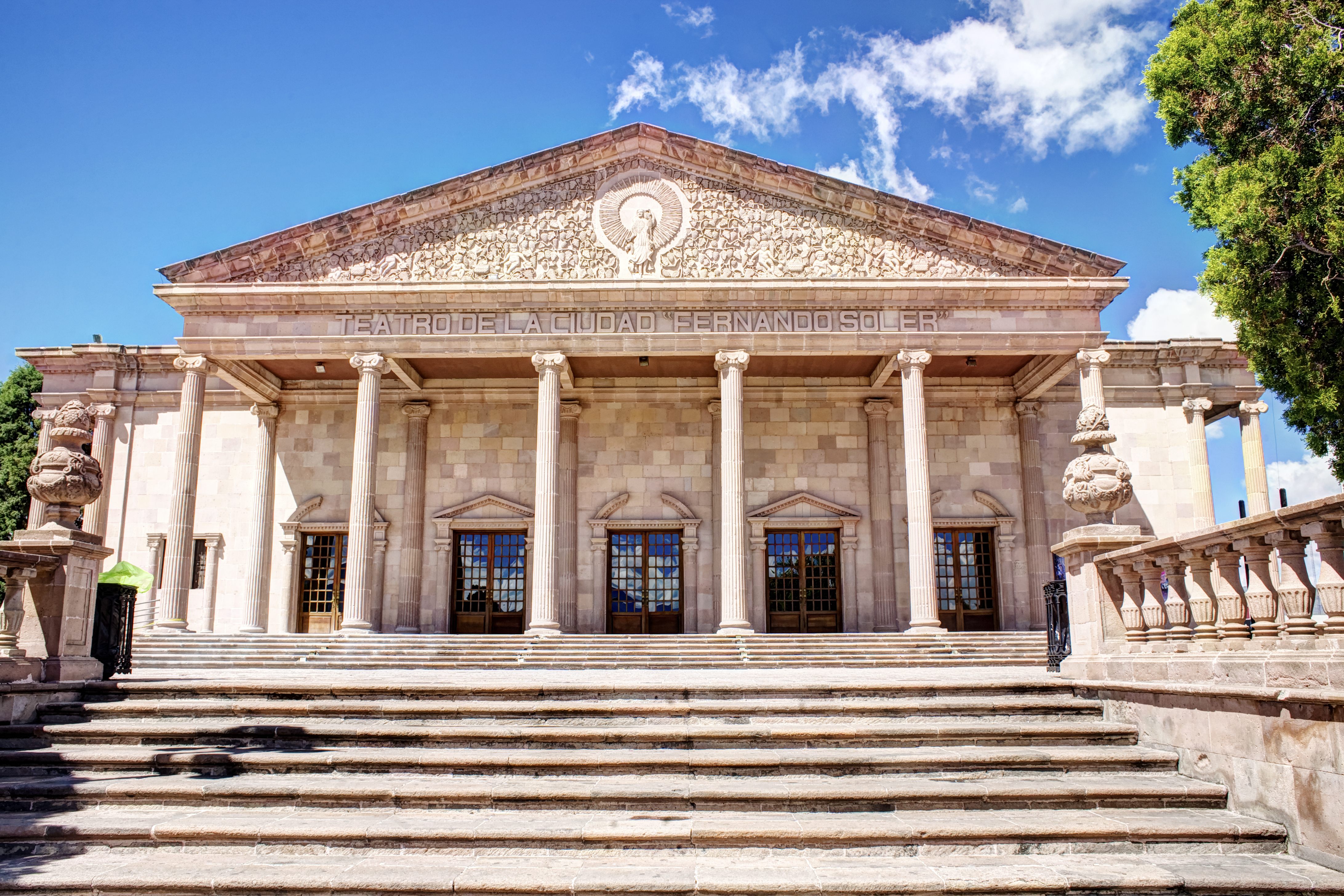 Fachada del Teatro de la Ciudad de Saltillo Coahuila "Fernando Soler".